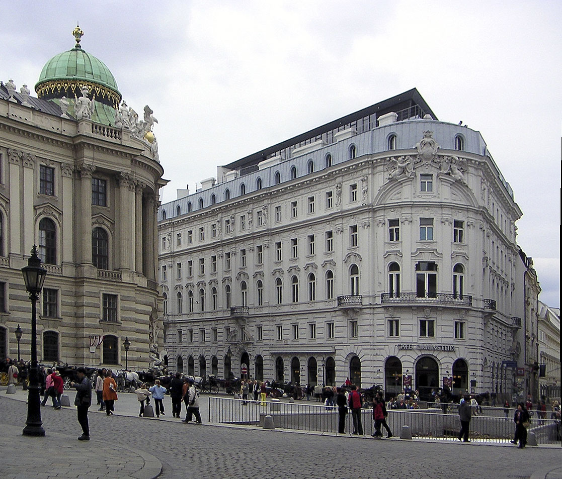 Wien, , selbst fotografiert